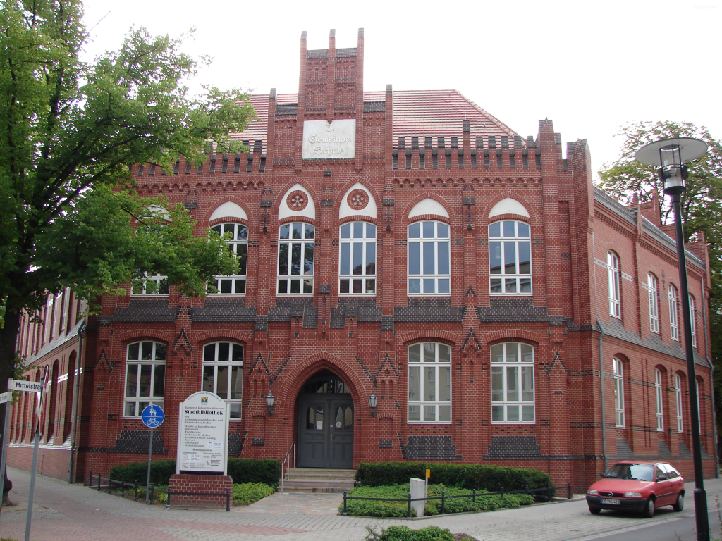 Bibliothek der Stadt Weißwasser ( vorher 4. POS)